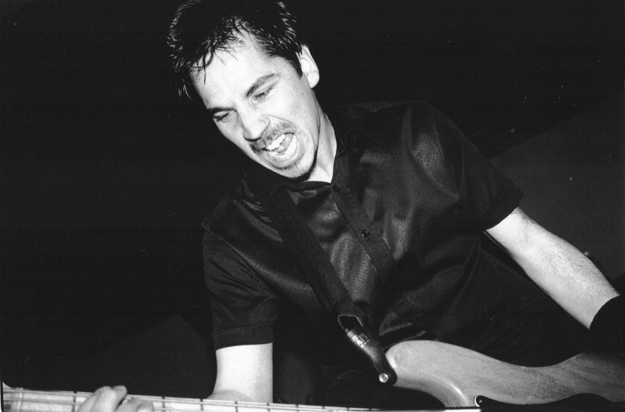 Dave Anderson von earthtone9 live auf der Abschiedstour 2002